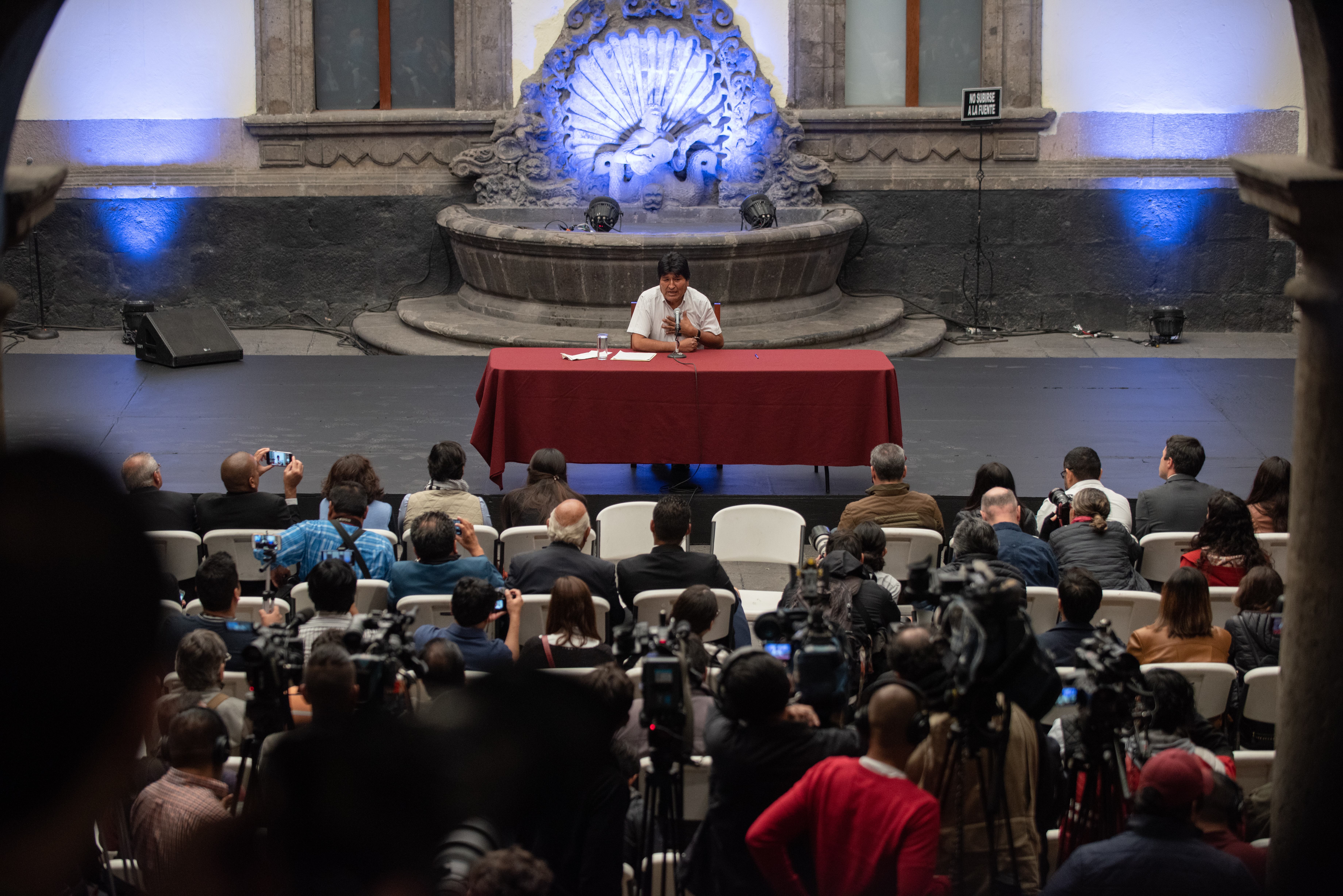 El político boliviano en conferencia de prensa en el Museo de la Ciudad de México.